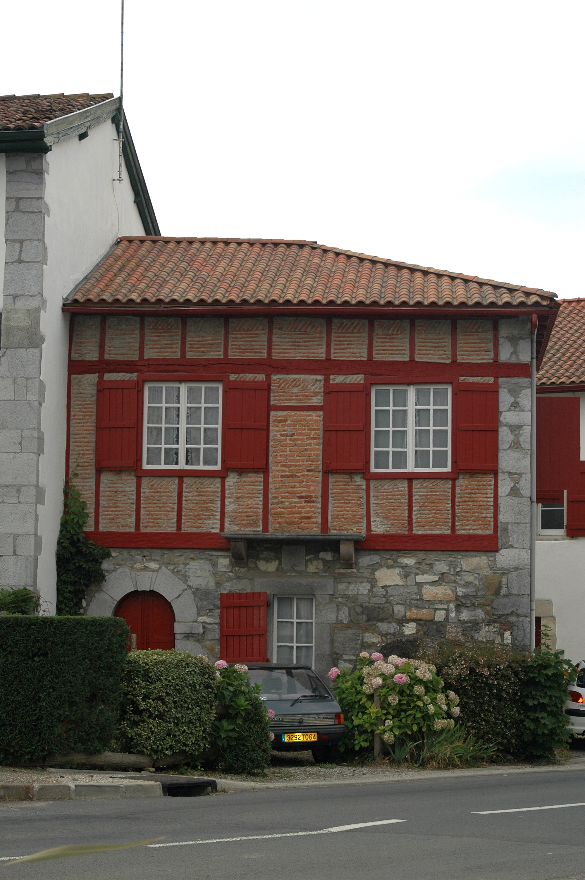 Larressore, maison basque. Photo prise le 08/08/06 par Harrieta171